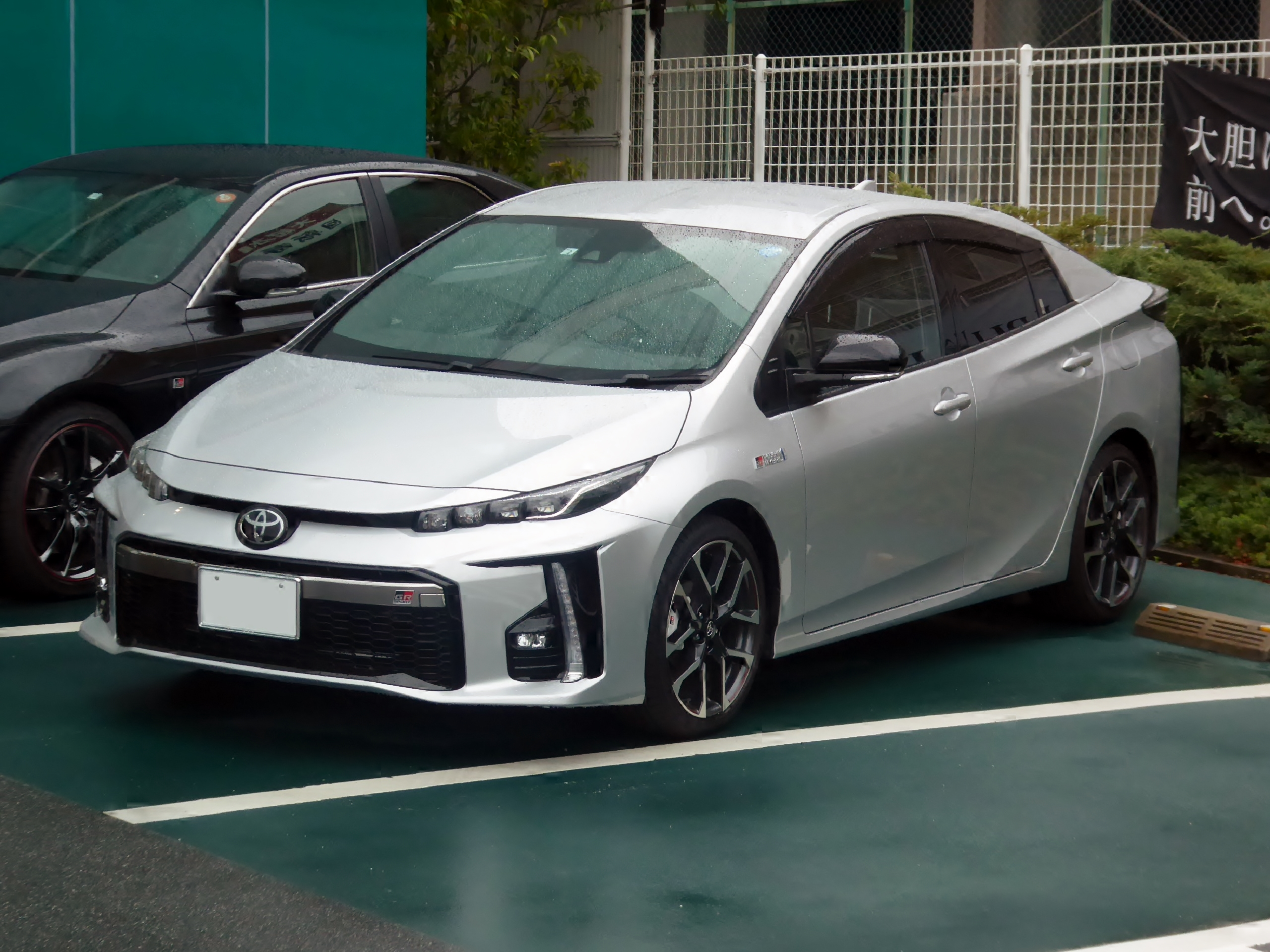 DLA-ZVW52-VLJBXE型トヨタ・プリウスPHV S"GR SPORT"をフロントから撮影。